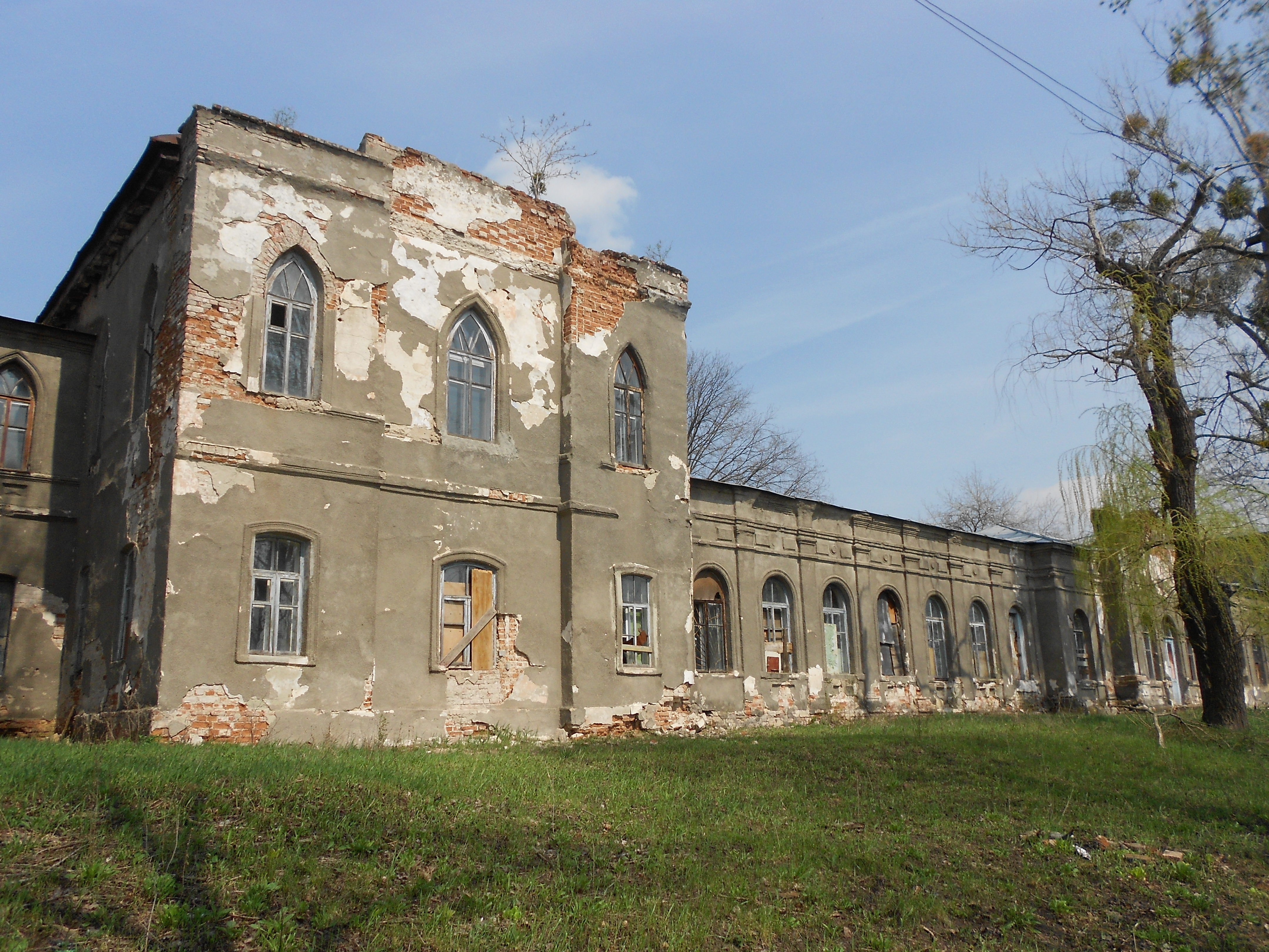 Усадьба Святополк-Мирских (мур.), Люботин, пл.Жовтнева